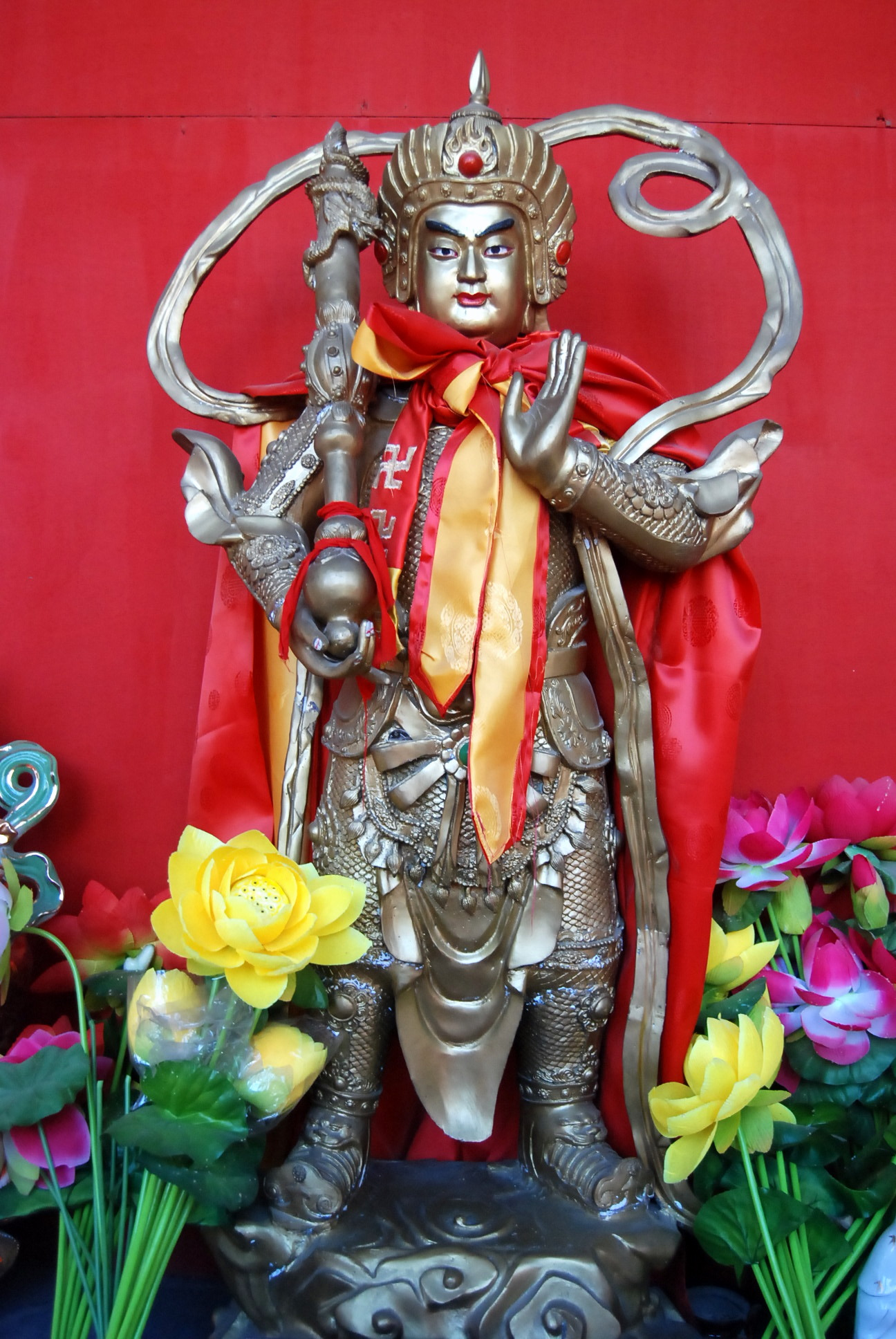 北京妙应寺中的韦陀像